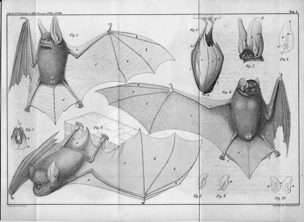 Tafel I aus Das Wesentliche der Chiropteren mit besonderer Beschreibung der in dem Herzogthum Nassau und den angränzenden Landestheilen vorkommenden Fledermäuse. In: Jahrbücher des Nassauischen Vereins für Naturkunde Band 17/18 (1862/63) S. 261–593.